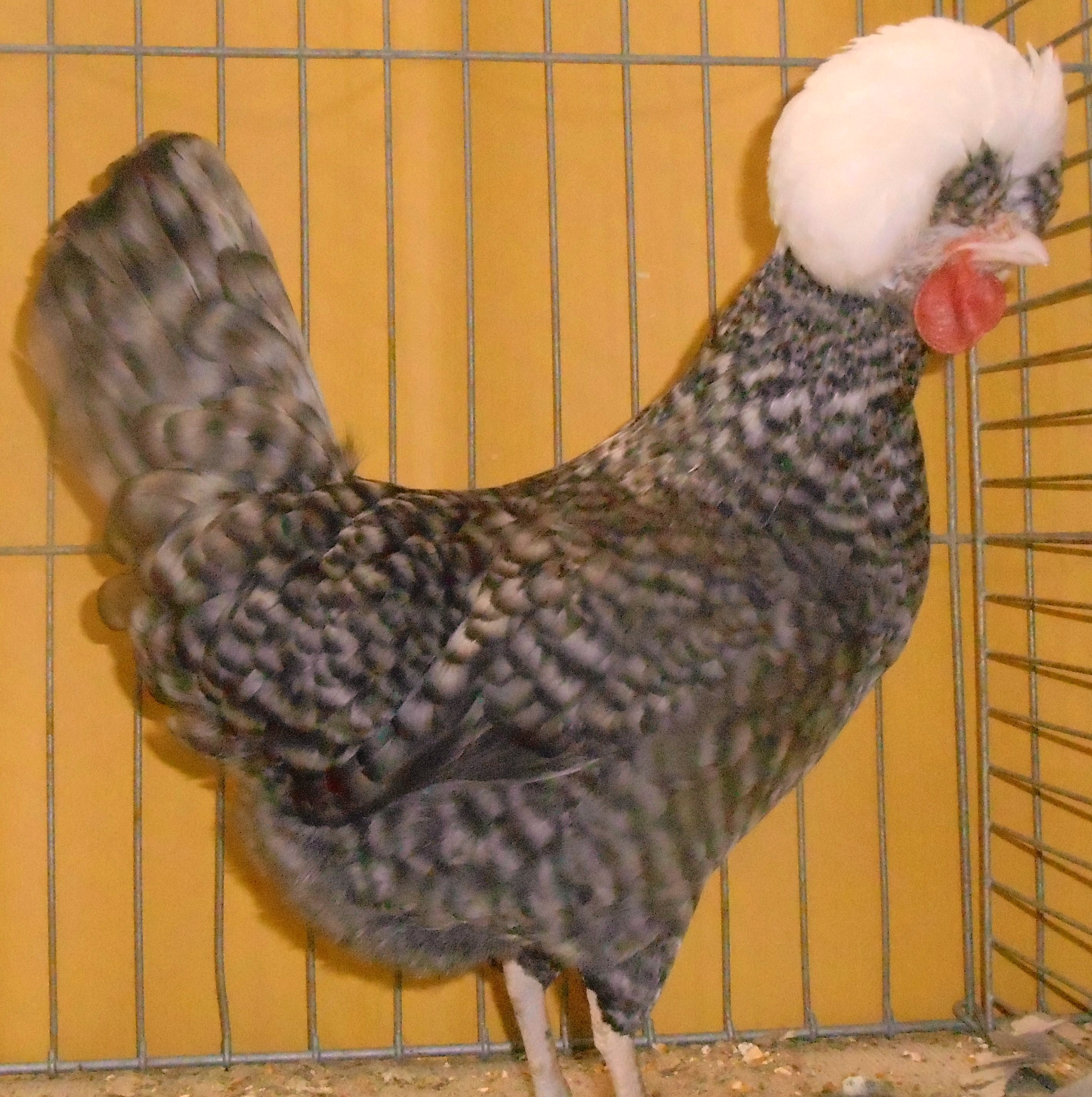 Holländer Haubenhuhn Weißhaube gesperbert Hannover 2014